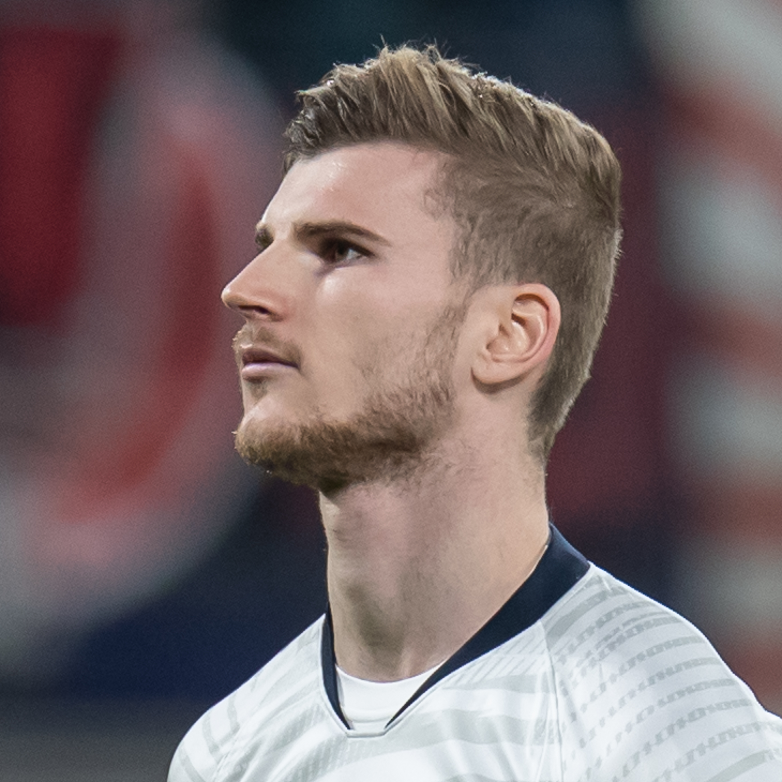 Fußball, Männer, UEFA Champions League Achtelfinale, RB Leipzig - Tottenham Hotspur; Timo Werner (RB Leipzig, 11)